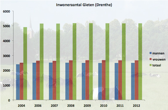 Grafische weergave van het inwoneraantal van het dorp Gieten in de gemeente Aa en Hunze